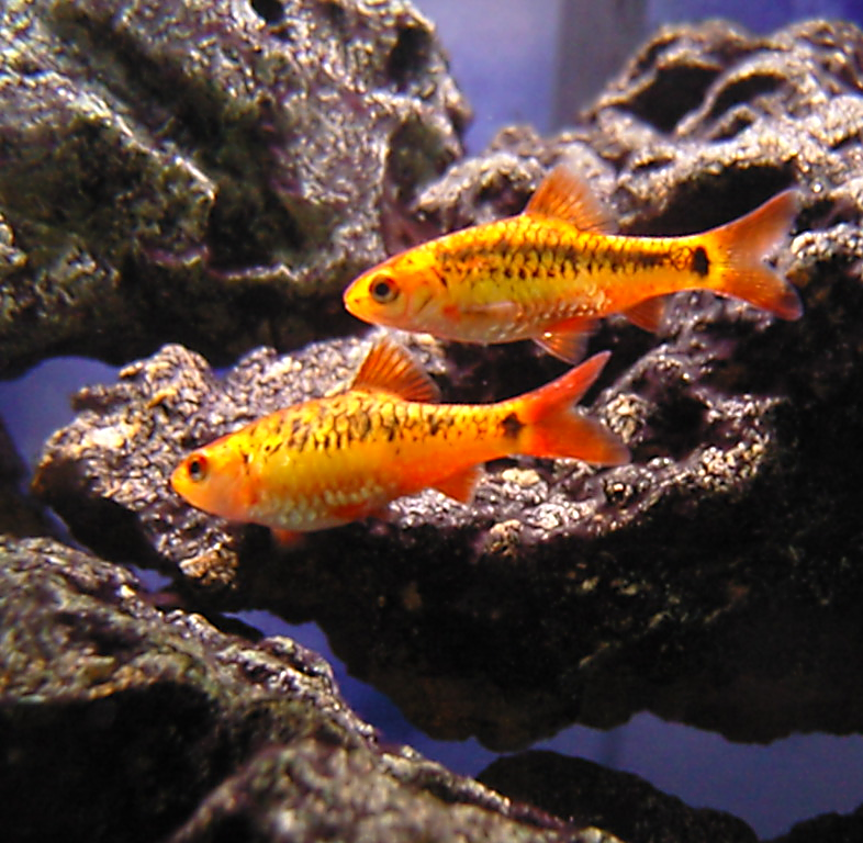 Gold Barb (Puntius semifasciolatus)